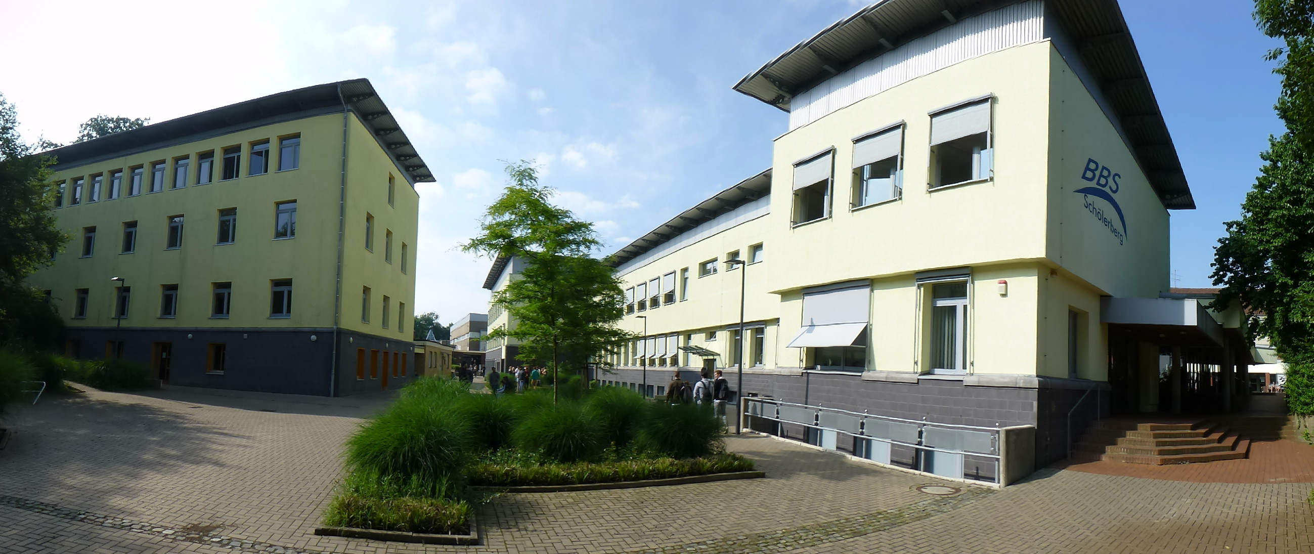 BBS am Schölerberg Panorama